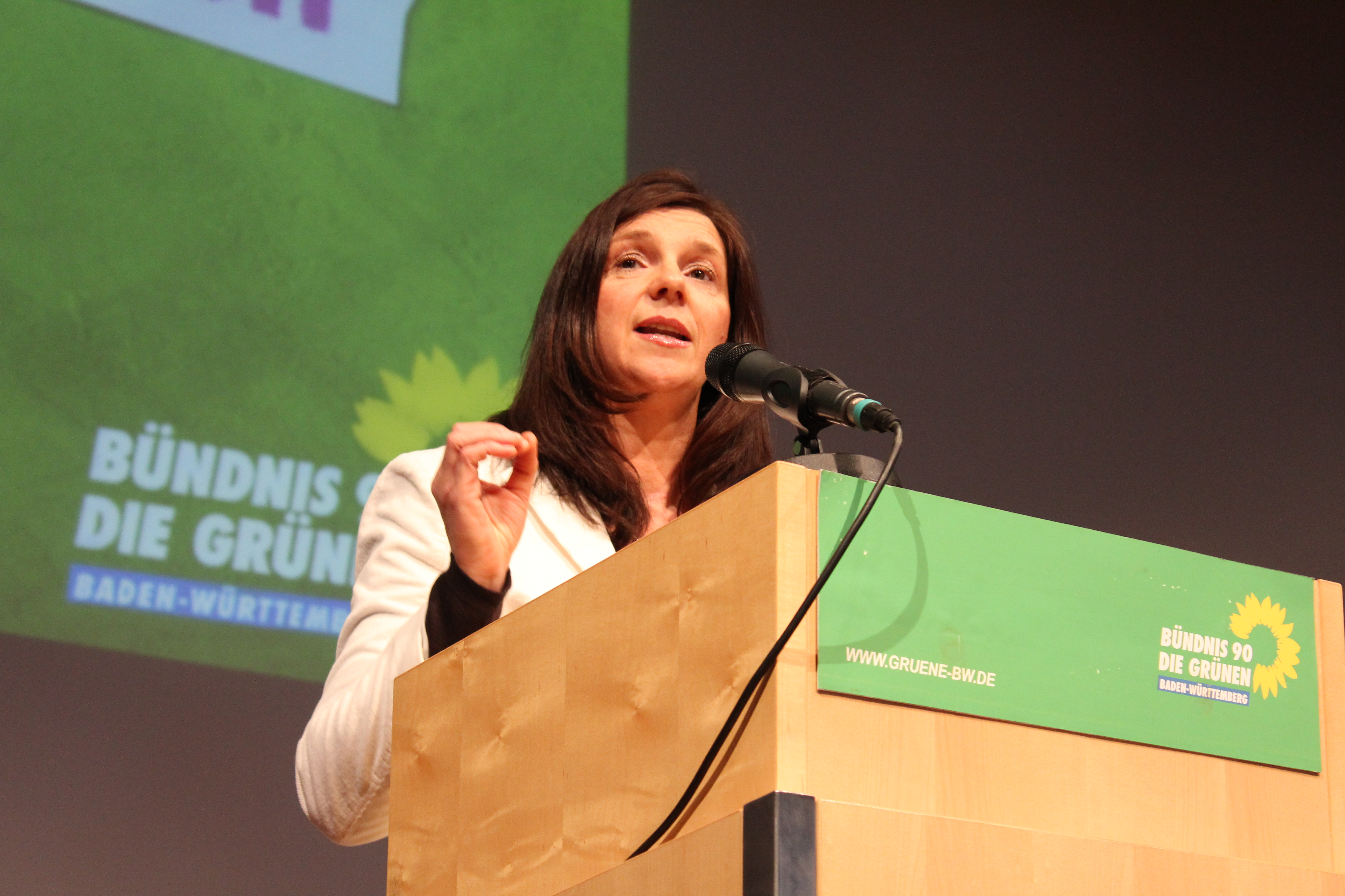 Katrin Göring-Eckardt beim Politischer Aschermittwoch 2013 der Grünen BW